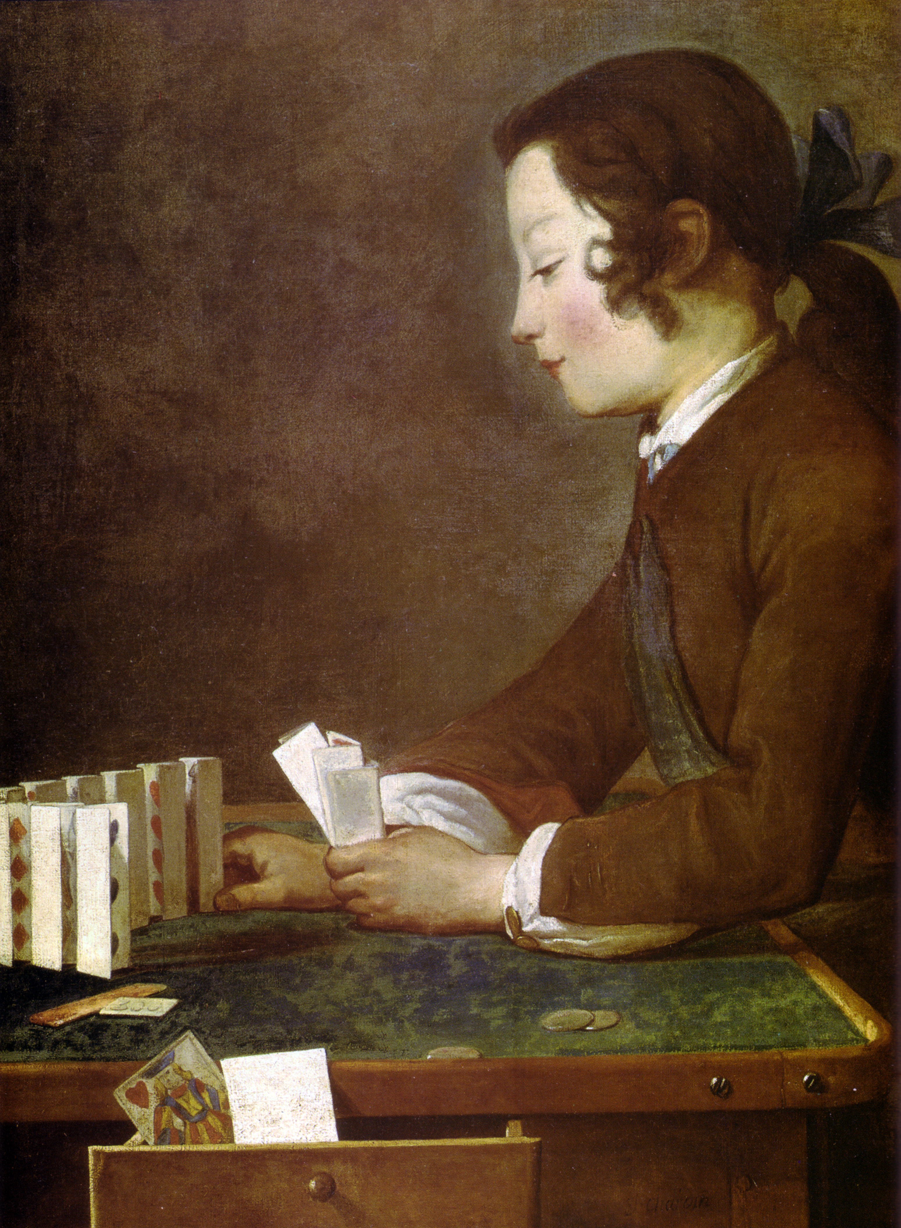 Close-up